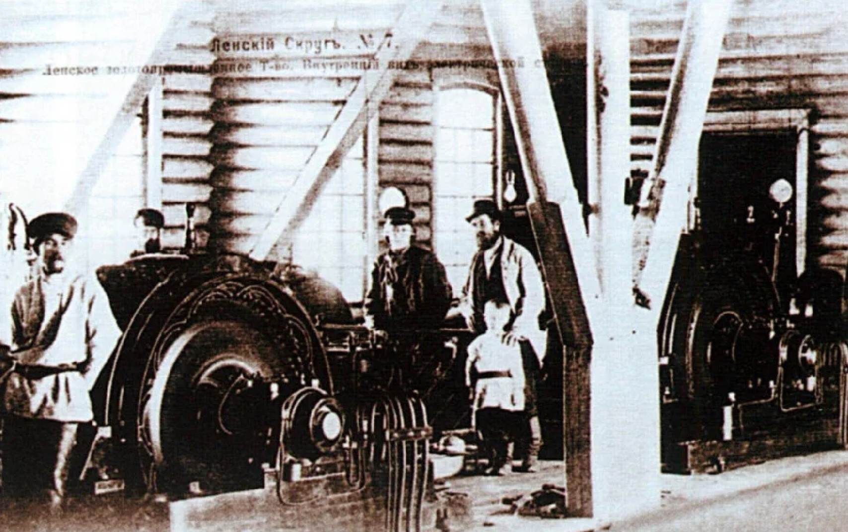 Elektrárna Lenského zlatorudního sdružení na řece Nygri